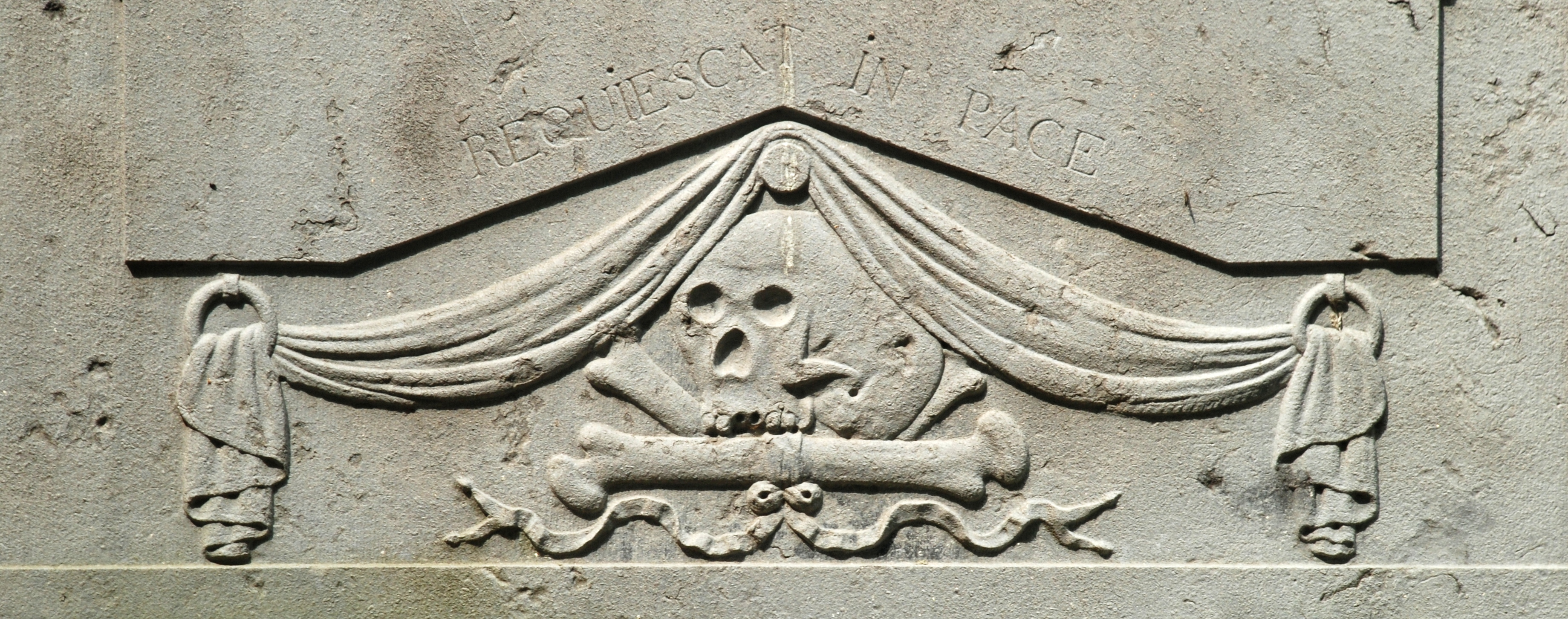 Belgique - Brabant wallon - Ottignies - Église Saint-Rémi